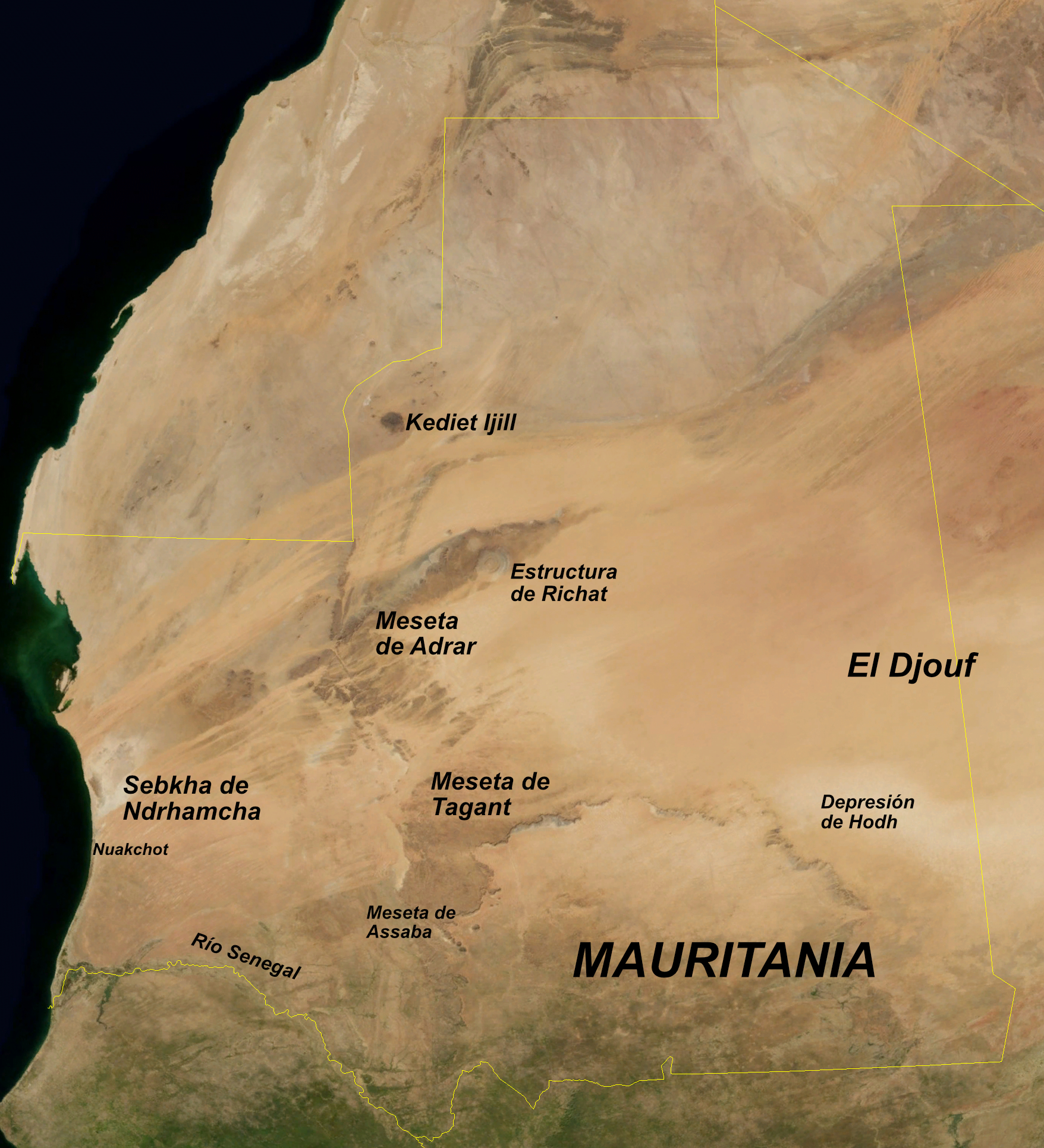 Vista satélite de Mauritania con accidentes geográficos en español